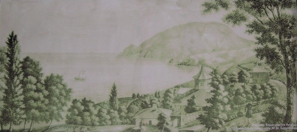 Имение Карасан во время М. М. Бороздина